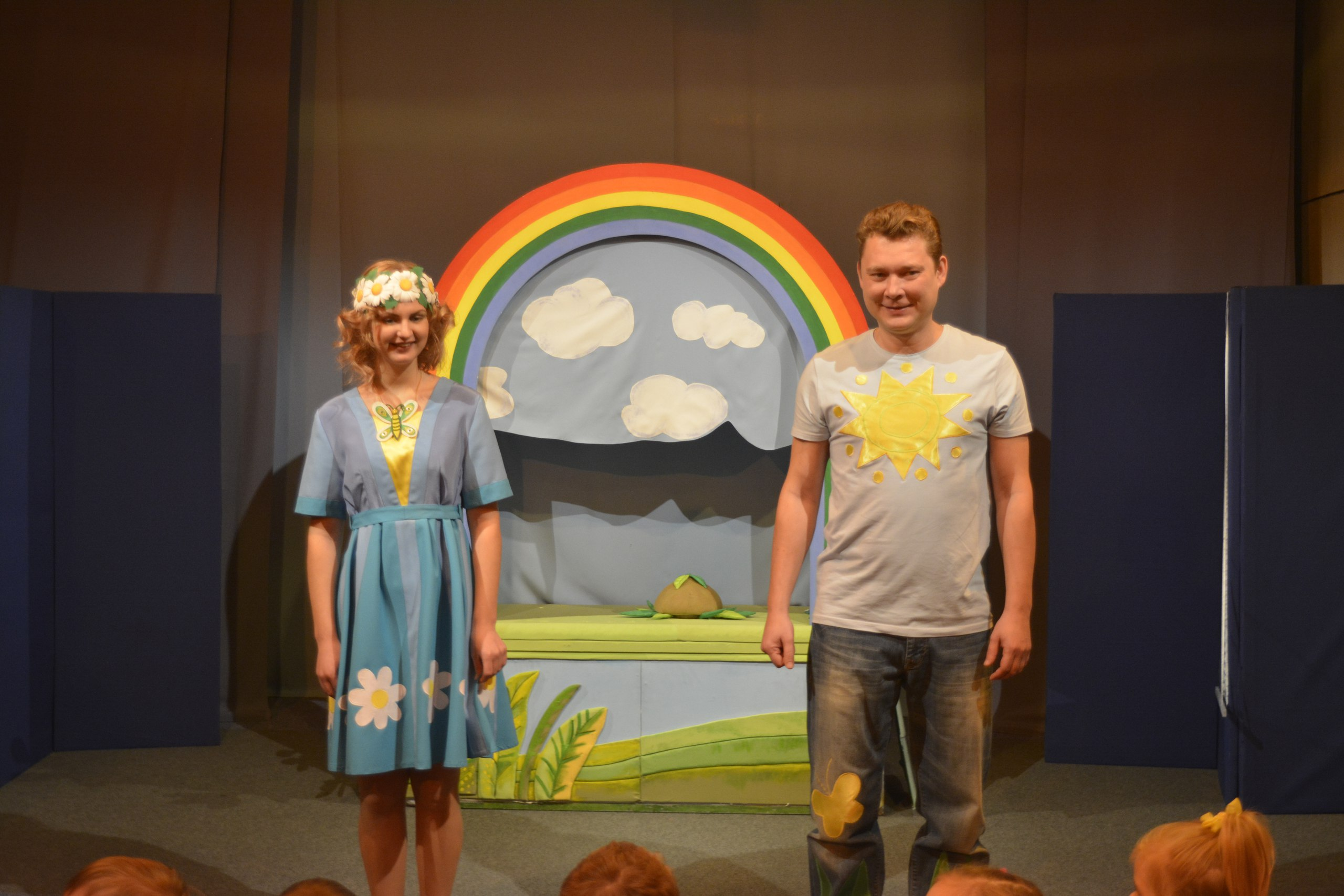 Сцена из спектакля Полянка